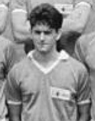 Title: Mannschaftsfoto 1. FC Union Berlin Factual corrections and alternative descriptions are encouraged separately from the original description. Additionally errors can be reported at this page to inform the Bundesarchiv. Original historic description: ADN-ZB-Roeske-3.8.88-ma-Berlin: 1. FC Union Berlin. Die Fußball-Mannschaft für die DDR-Oberligasaison 1988-89: Hintere Reihe v.l.n.r.: Peter Schoknecht, Olaf Reinbold, Olaf Seier, Norbert Trieloff, Rene Adamczewski, Steffen Enge und Rene Unglaube. Mittlere Reihe v.l.n.r.: Trainer Manfred Staender, Trainer Harry Schröter, Trainer Karsten Heine, Dirk Koenen, Michael Weinrich, Frank Plazcek, Andreas Nagel, Mario Mack, Matthias Morack, Masseur Günther Steinicke, Mannschaftsleiter Herbert Domschke, Mannschaftsarzt Dr. med. Günter Hensch. Vordere Reihe v.l.n.r.: Andre Sirocks, Volker Probst, Olaf Zimmermann, torhüter Steffen Schlegel, Torhüter Detlef Hartmann, Bernd Jopek, Lutz Hendel und Olaf Hirsch.